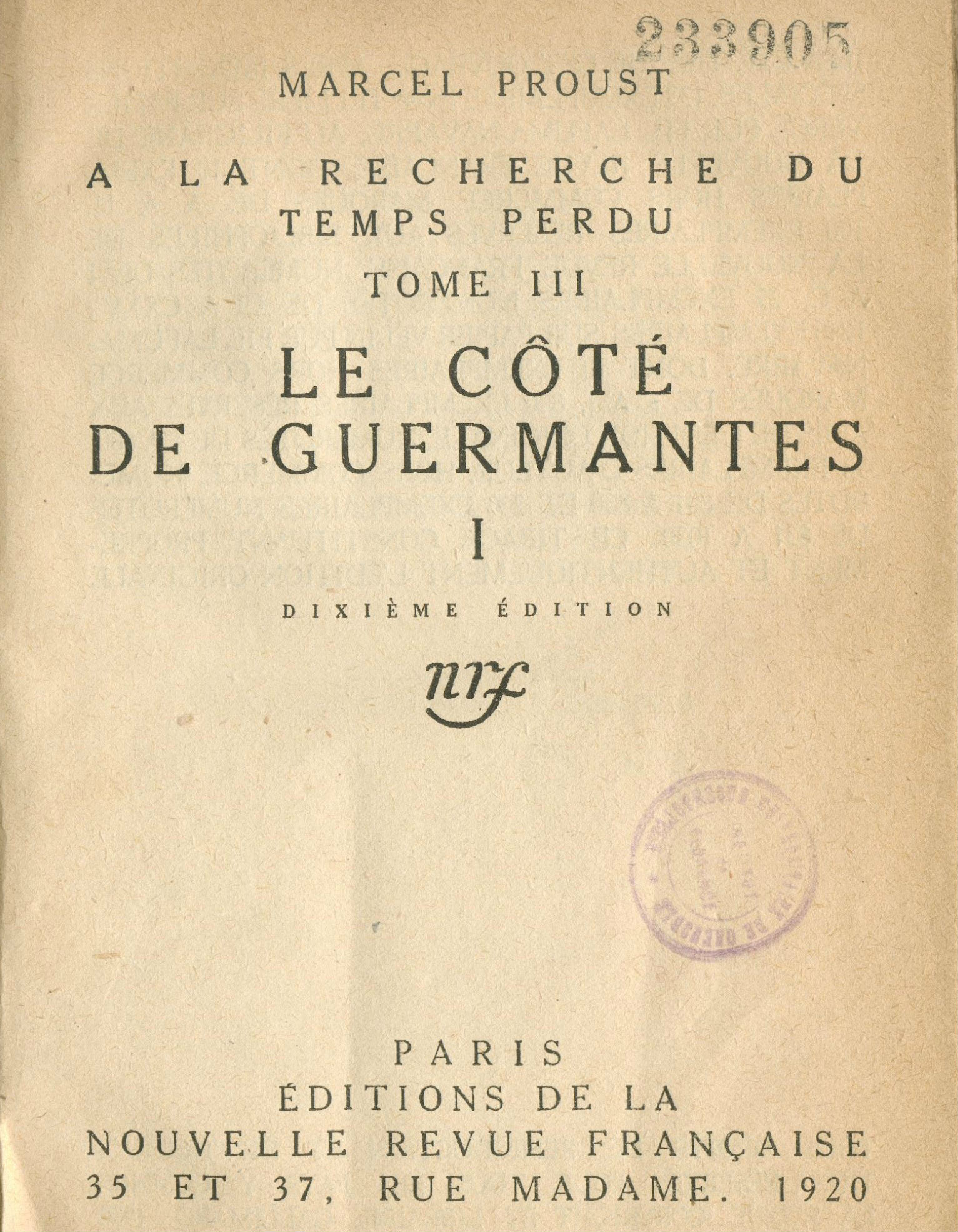 Couverture de l'édition originale de "Le Côté de Guermantes" tome 1 de Marcel Proust (Nouvelle Revue française) - Fonds de la bibliothèque de l'Institut français de Florence - Fausse mention de dixième édition.